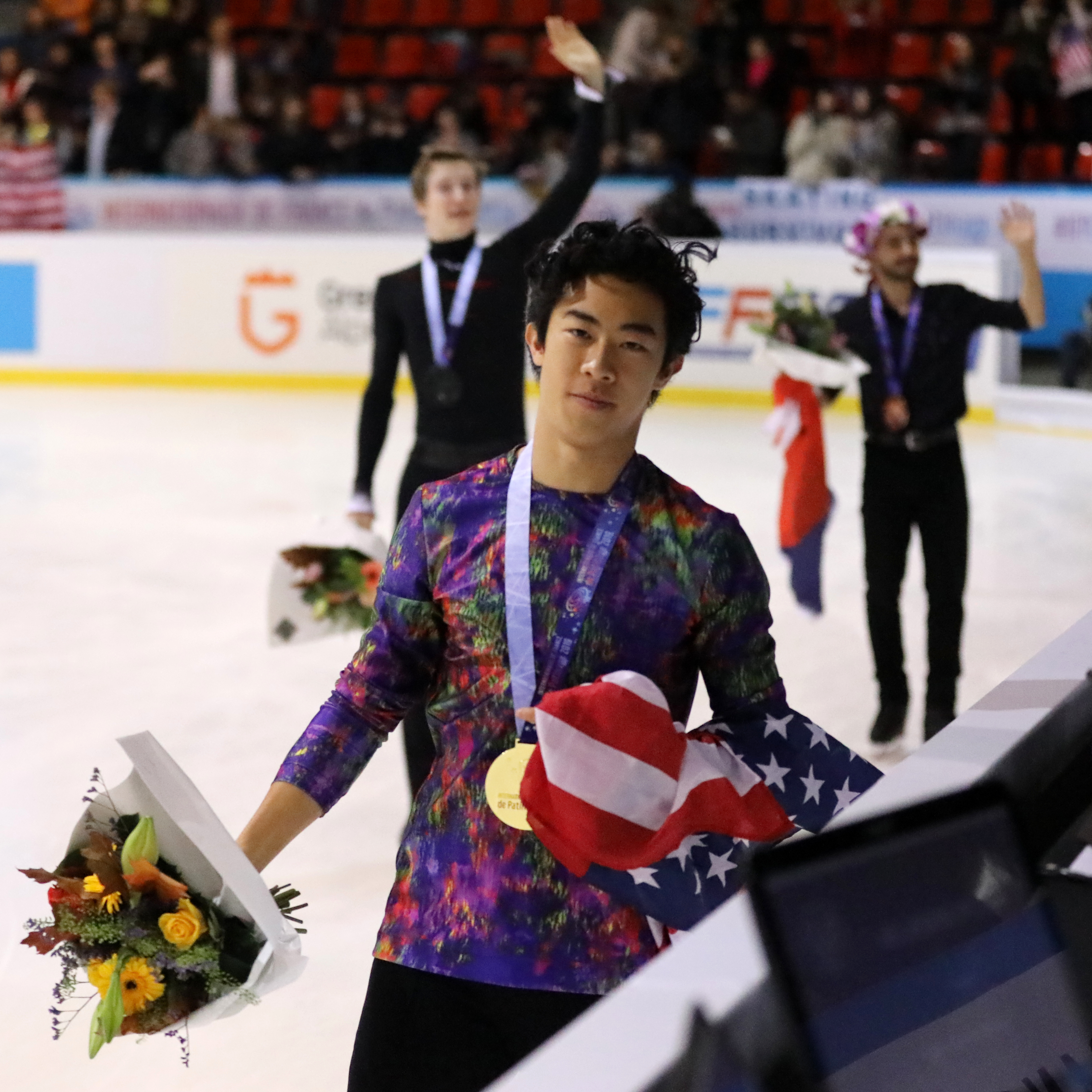 Internationaux de France 2019